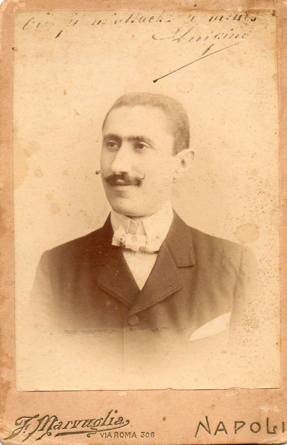 Ing. G. Luigi Mellucci